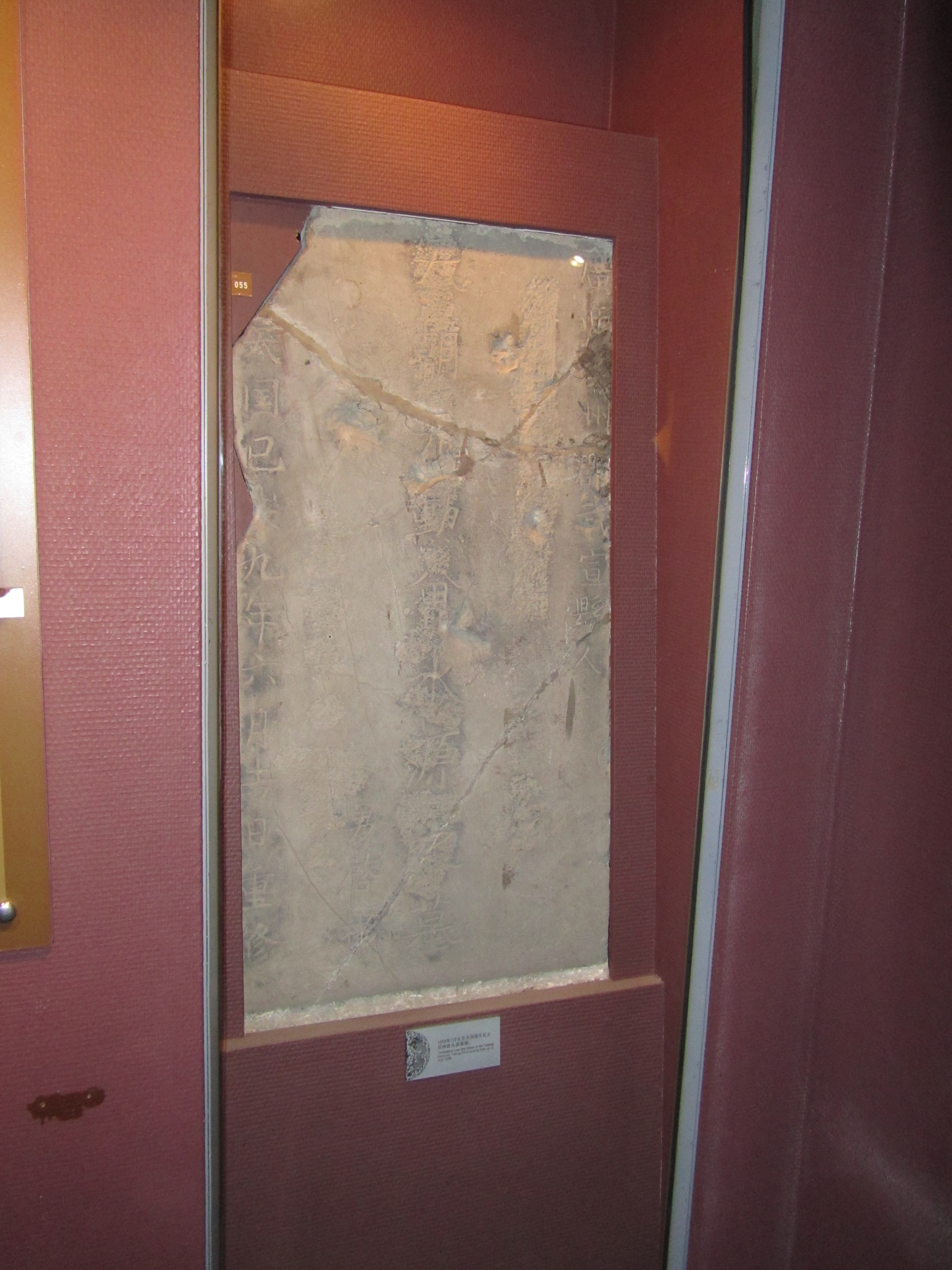 南京太平天国时期天官正丞相曾水源墓墓碑，藏于瞻园。